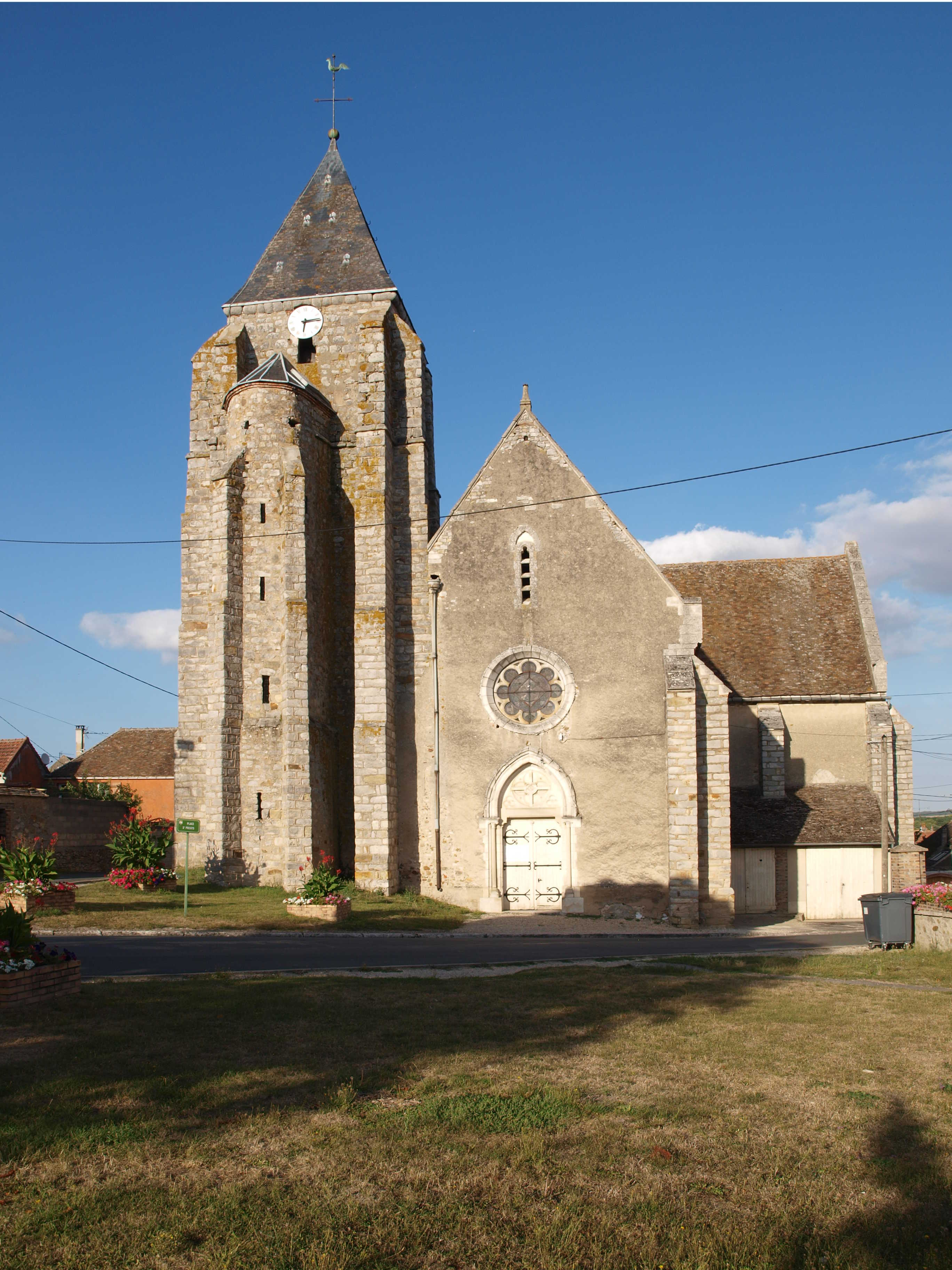 Villemanoche (Yonne, France), son église